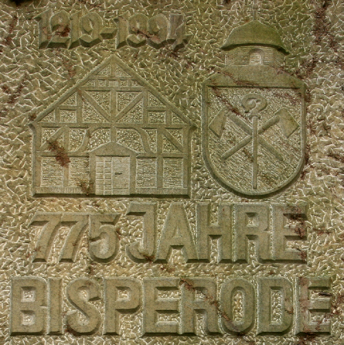 Steintafel anlässlich der 775 Jahrfeier im Jahr 1994 an der Schlossmauer angebracht